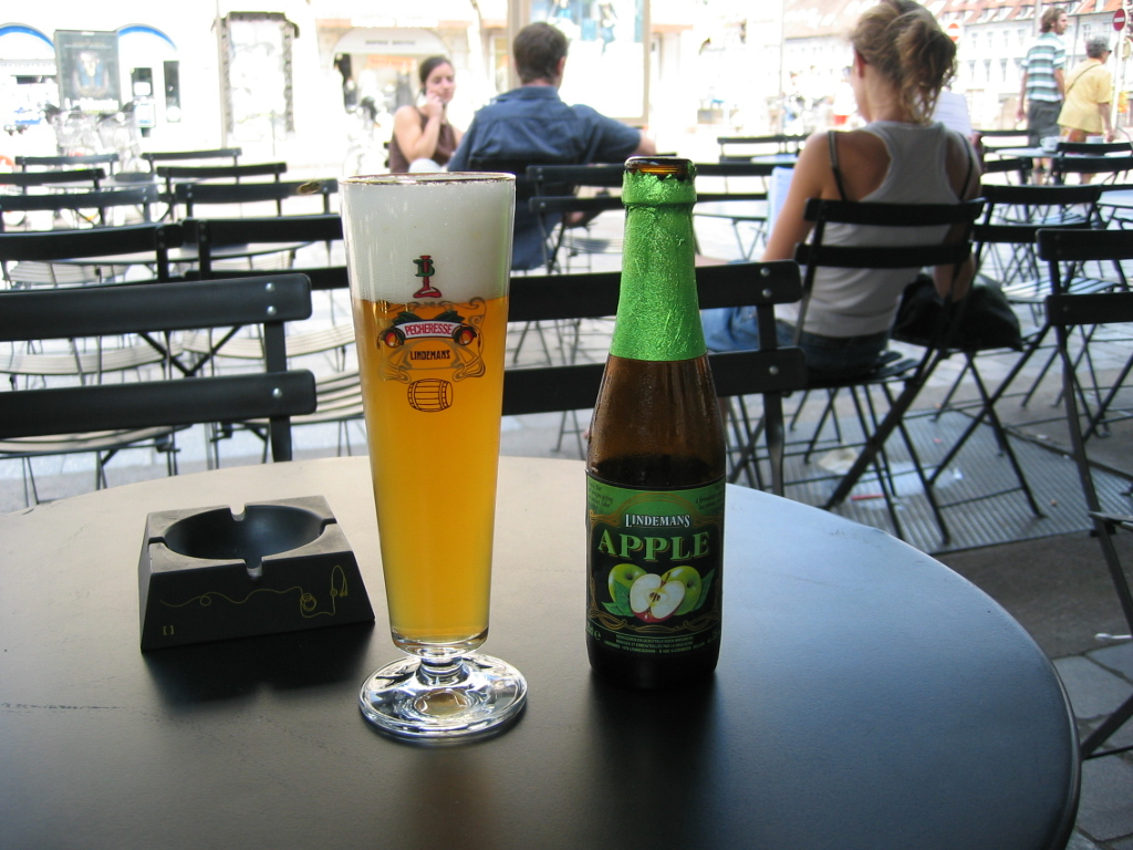 Lindemans Apple in een glas met opschrift van Lindemans Pecheresse